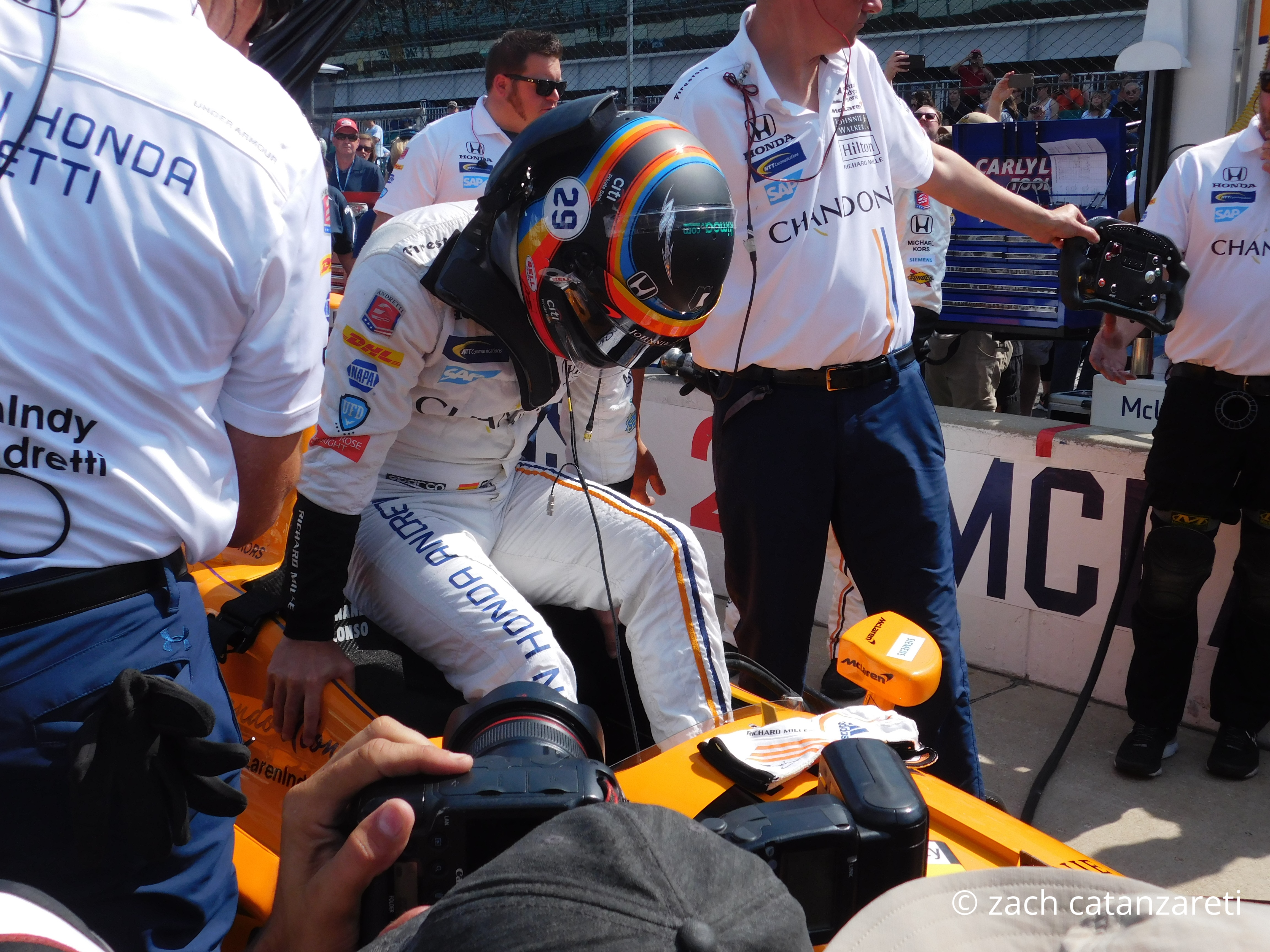 fernando alonso strapping in